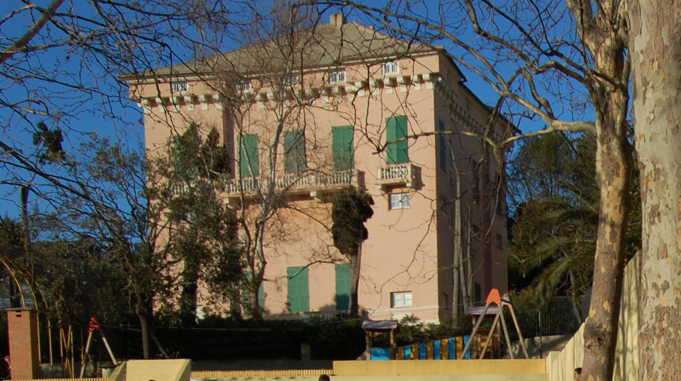 Villa Negrone della Loggia, Genova Pra'